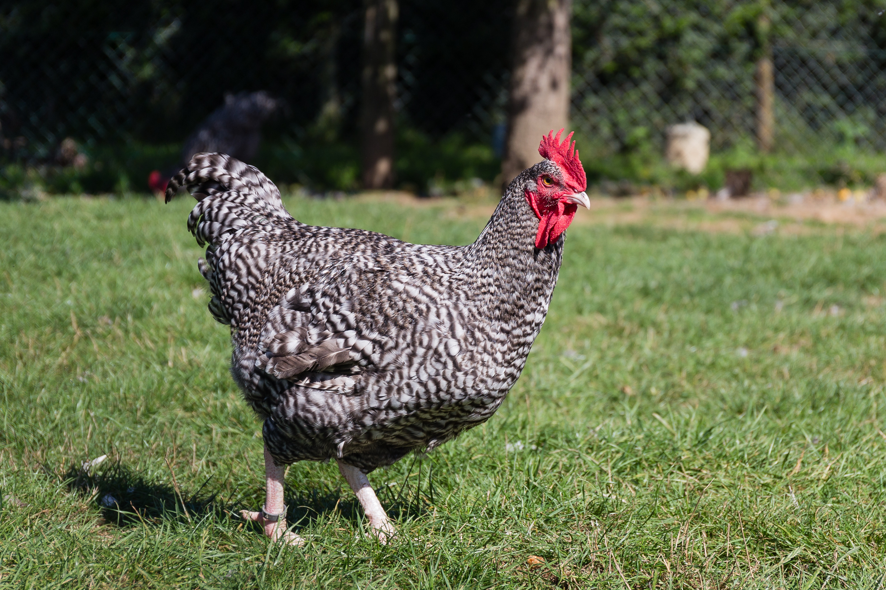 Coq coucou de Rennes à l'Écomusée du pays de Rennes.